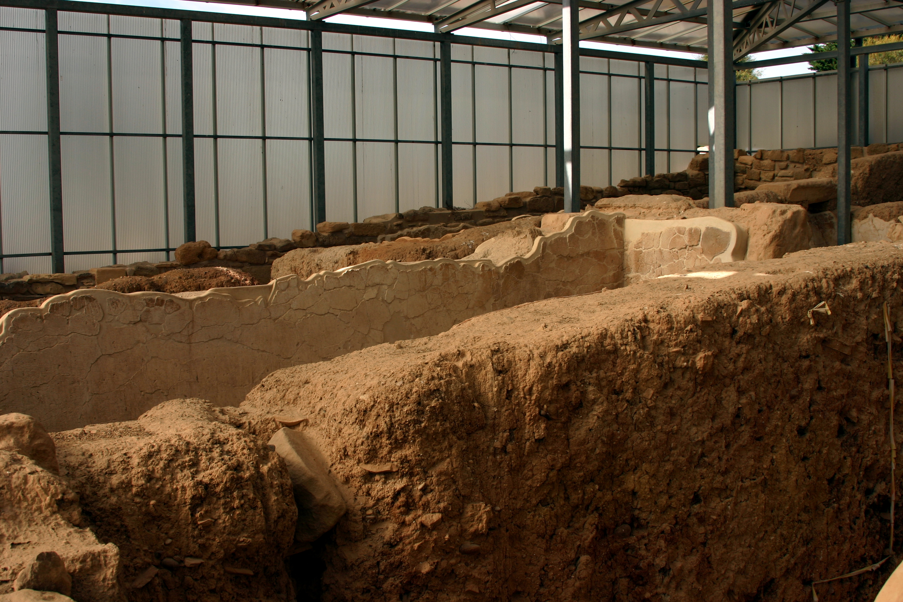 Heraclea Minoa